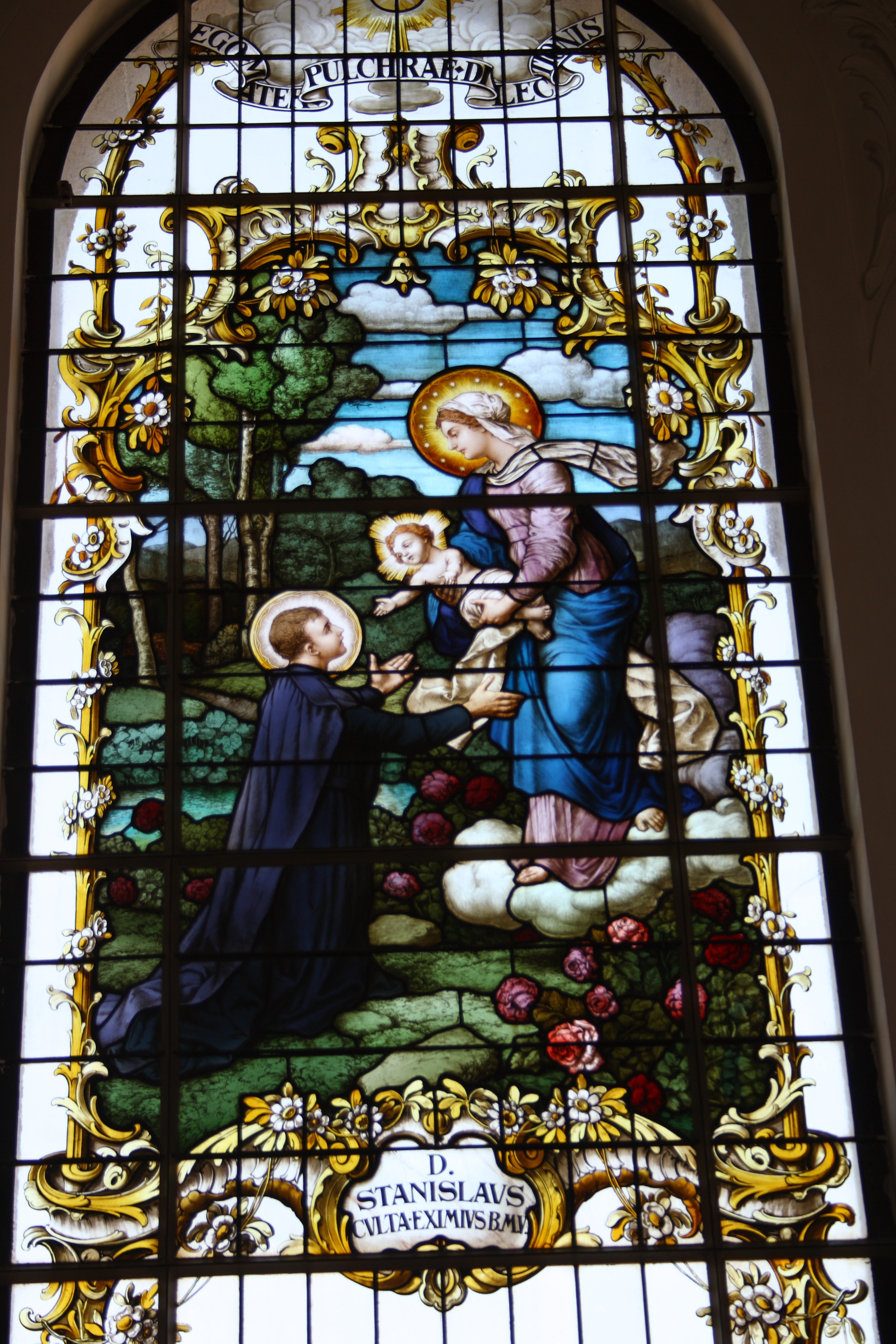 Katholische Kreuzauffindungskapelle, Hauskapelle der Akademie für Lehrerfortbildung und Personalführung in Bayern (ehemalige Kapelle des Priesterseminars) in Dillingen an der Donau (Bayern) von 1911, Glasfenster von Franz Xaver Zettler in München (1911), Darstellung: Stanislaus Kostka kniet vor Maria mit Jesuskind; Inschrift: D. STANISLAUS CULTA EXIMIUS B.M.V